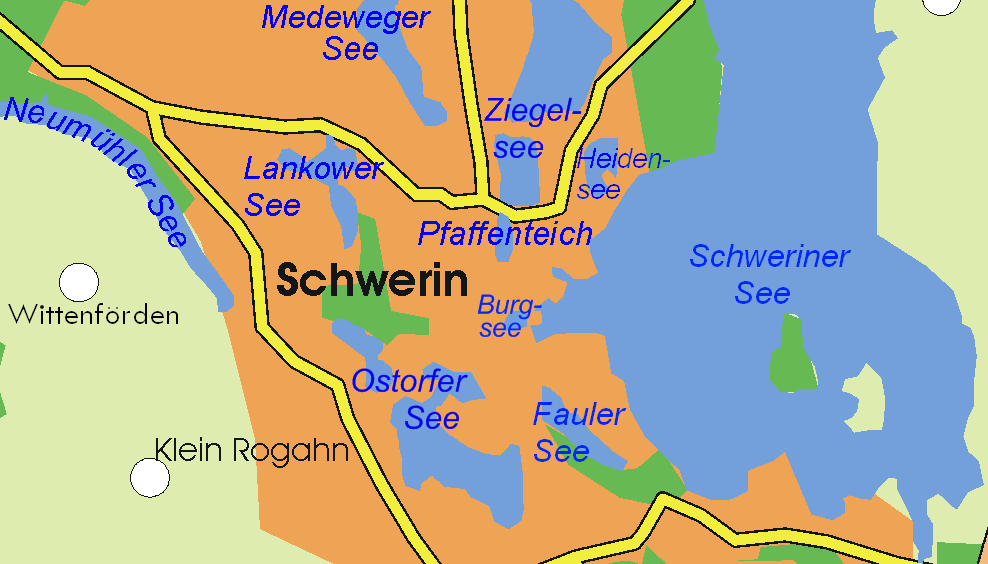 Lage der Seen in Schwerin, Position of the lakes in Schwerin